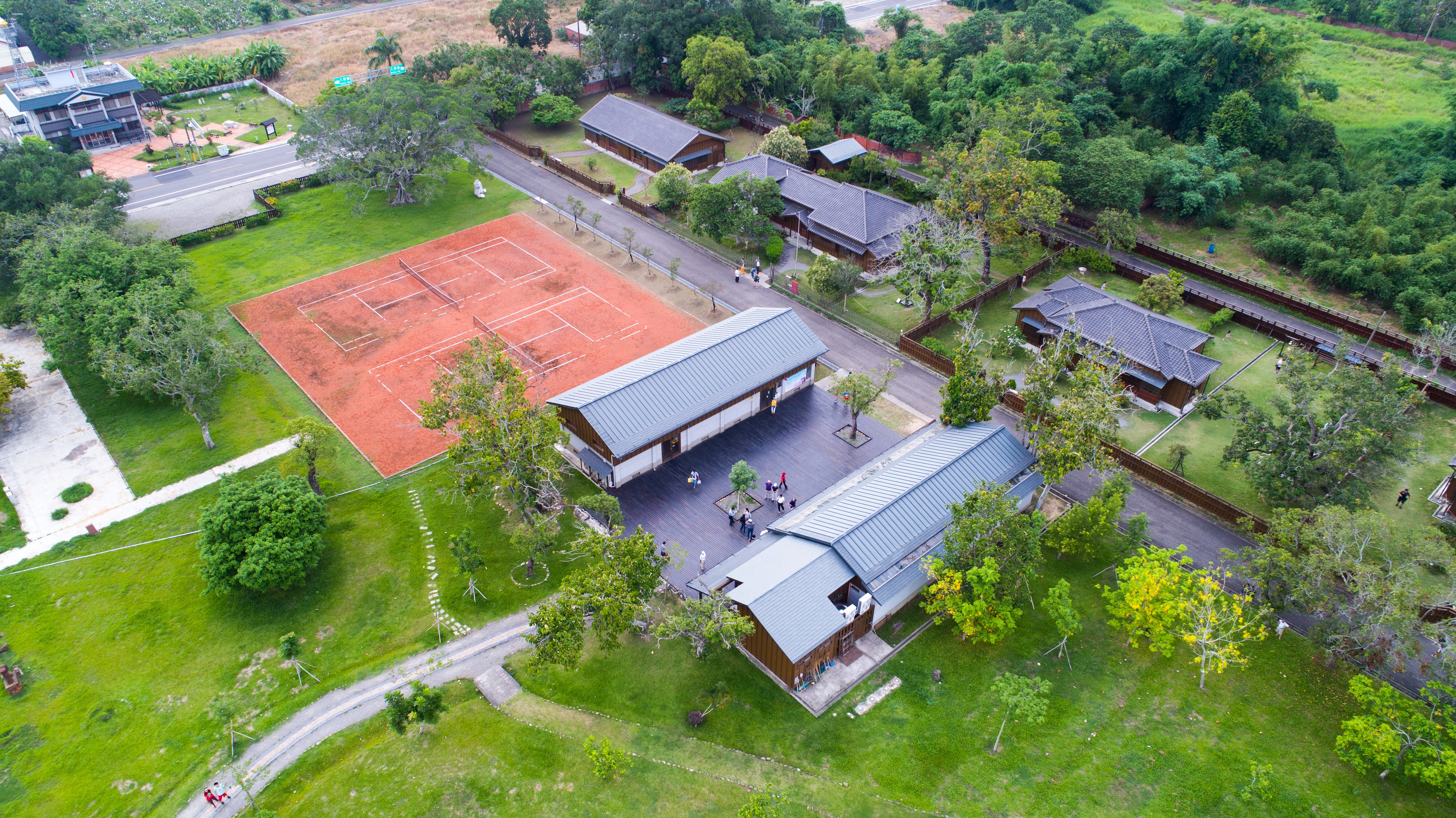 八田與一園區 ( 拍攝前已取得烏山頭水庫管理處授權 )